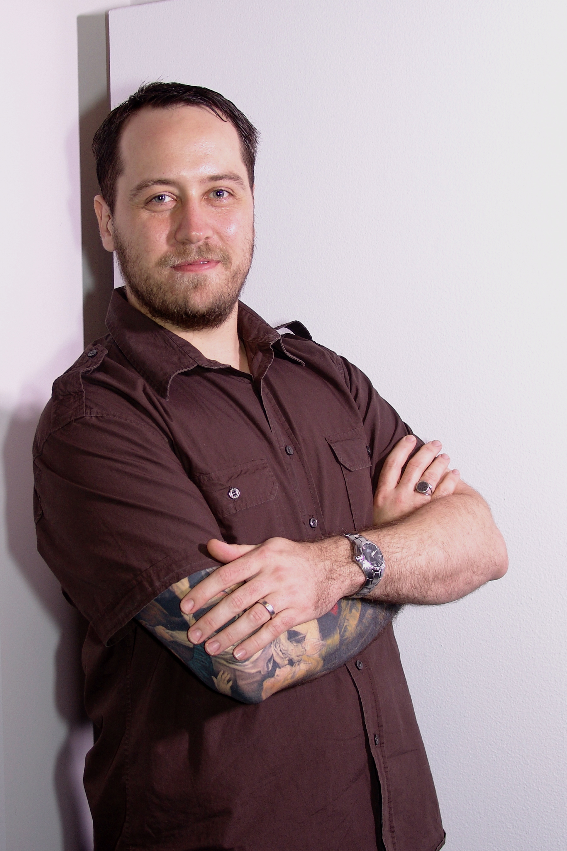 Artist Leslie Rice